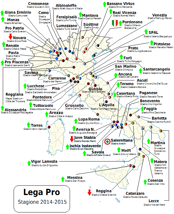 Squadre della Lega Pro 2014-2015, File basato su File:Italy provincial location map.svg